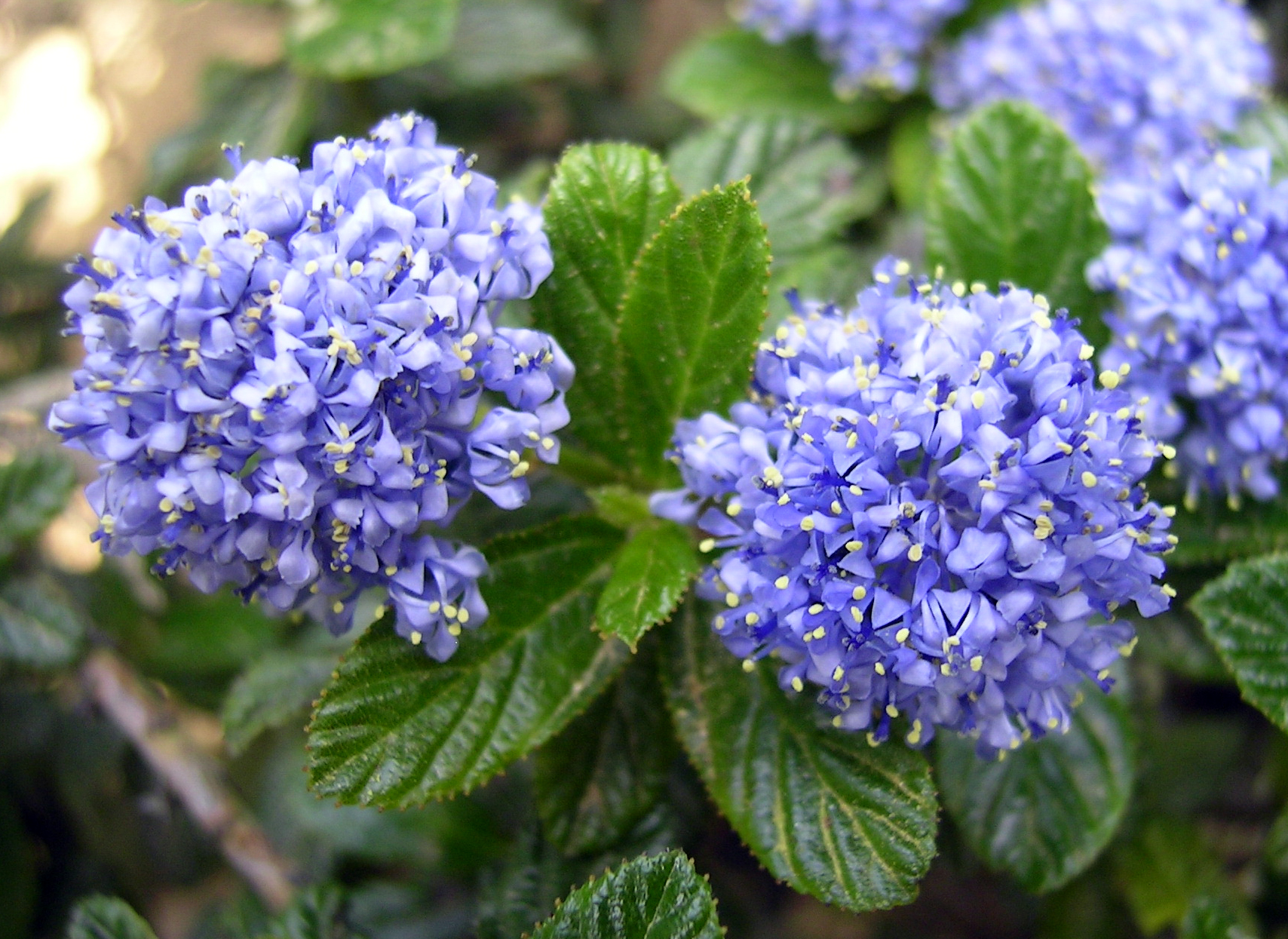 Ceanothus thyrsyflorus 'Repens',Familia: Rhamnaceae, en Jardì Botánic de Caixa de Girona-Cap Roig